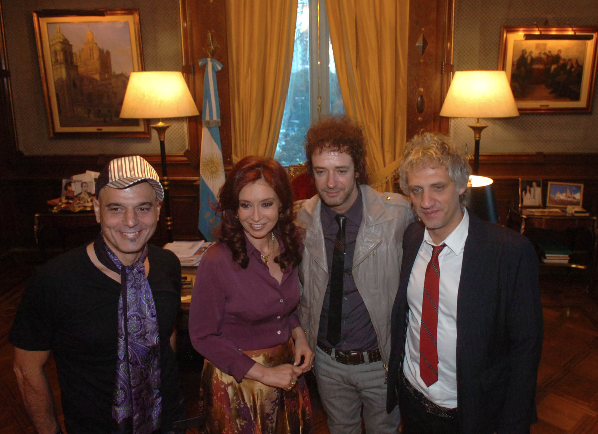 La Presidente Cristina Fernández de Kirchner junto a Soda Stereo.